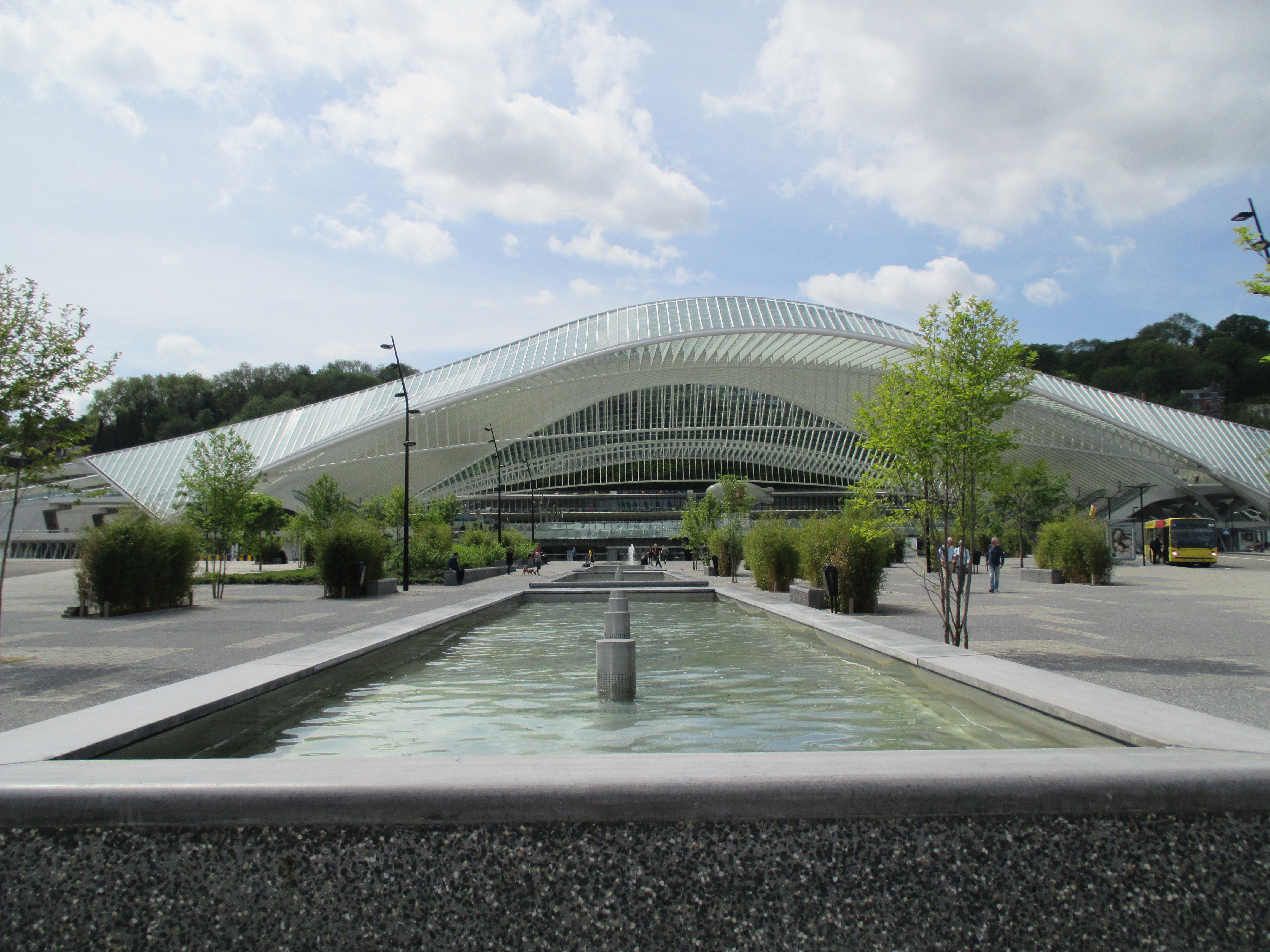 La place des Guillemins 2015